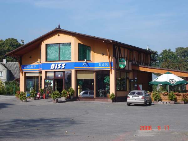 Stacja paliw w Redle